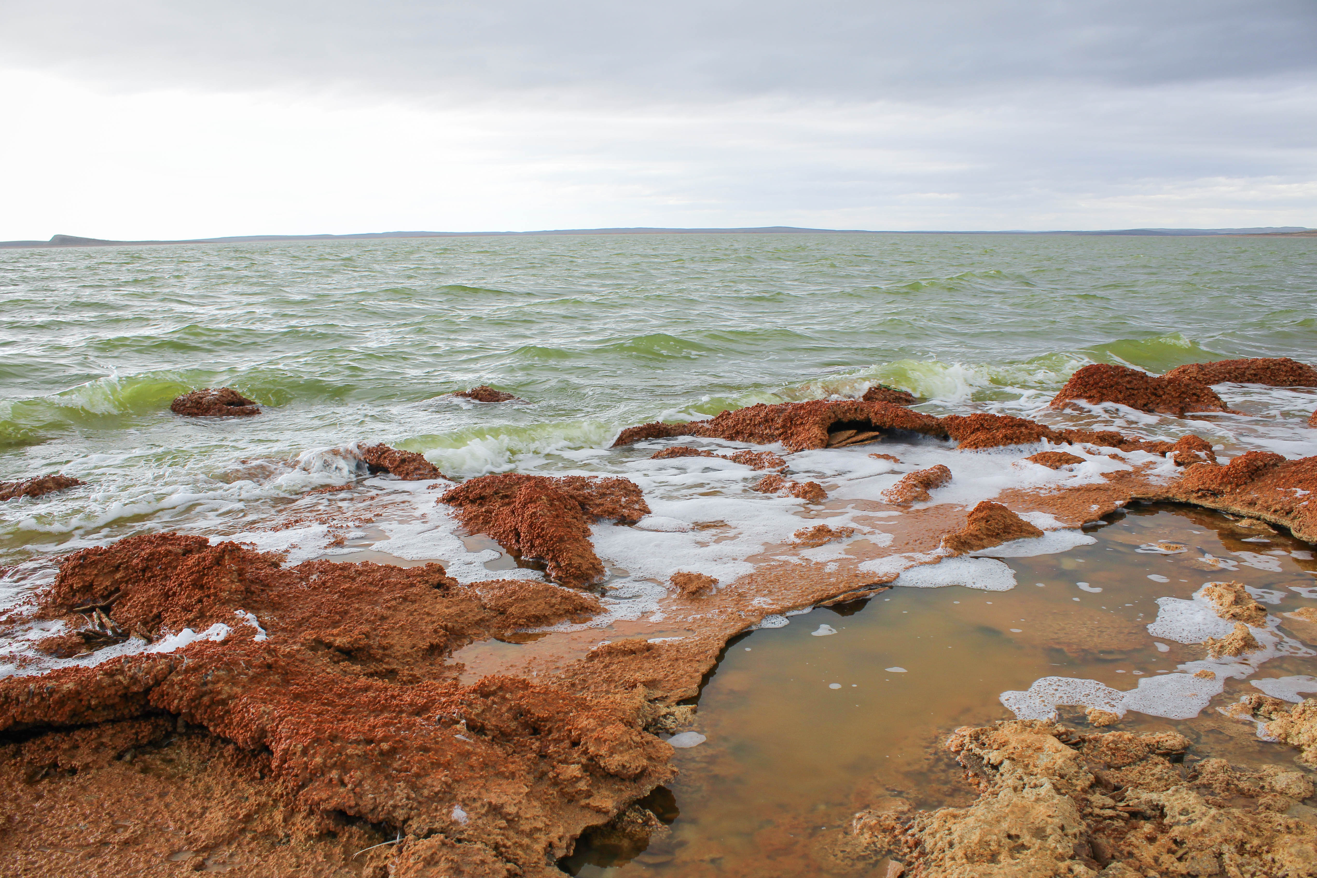 Estromatolitos, Monumento Natural Laguna de los Cisnes. Tierra del Fuego, Chile.